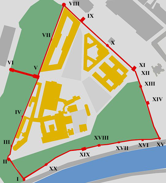 Schemat umocnień Moskiewskiego Kremla, z zaznaczonymi basztami